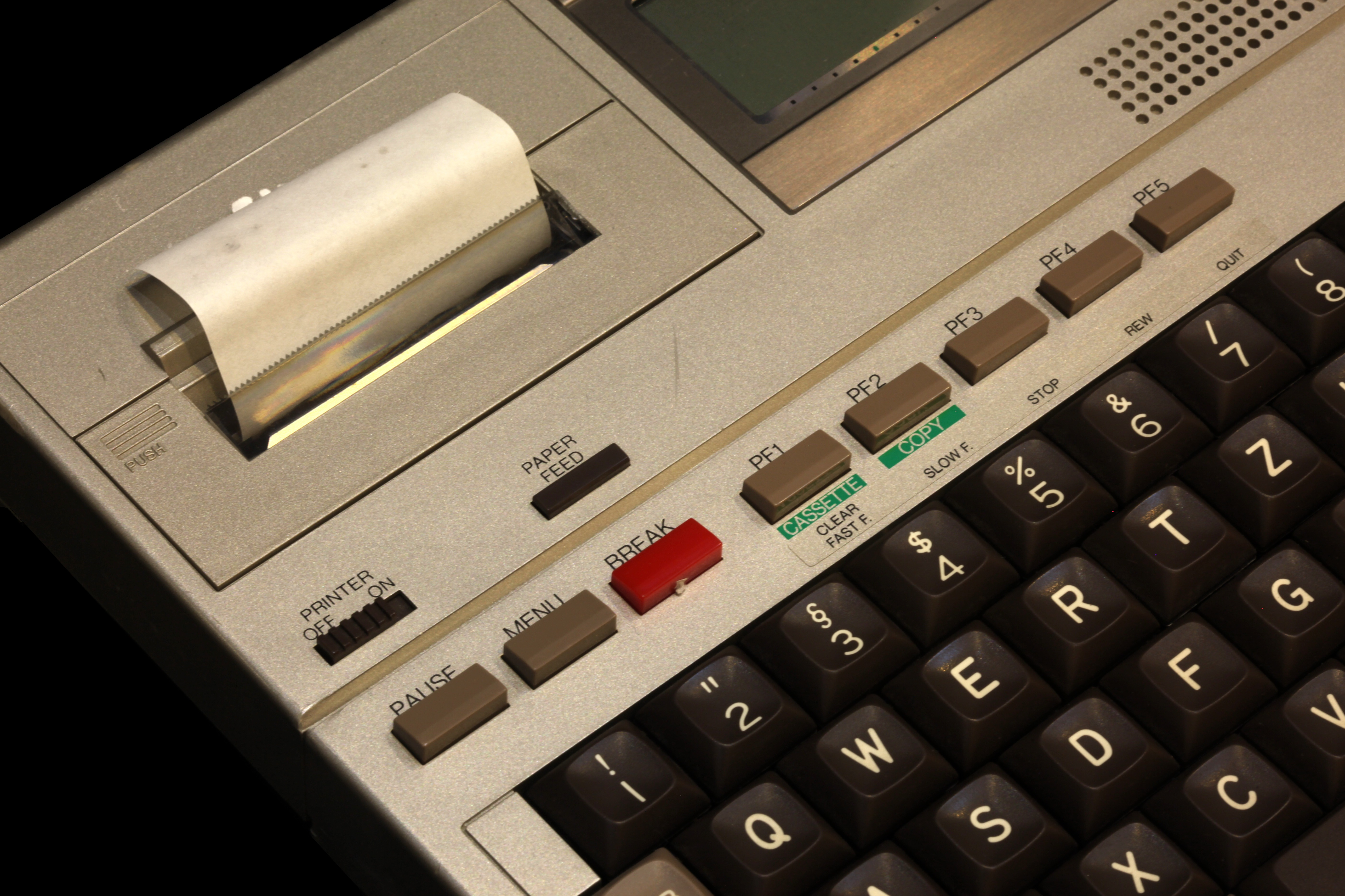 Epson HX-20 computer. On display at the Musée Bolo, EPFL, Lausanne.